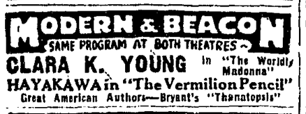 Advertisement, Boston, Massachusetts, USA